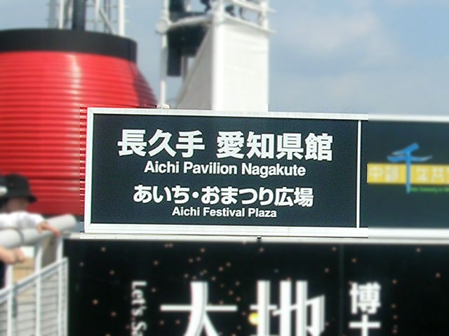 ゴシックMB101の使用例